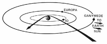 Trajectória da sonda Pioneer 10 em Jupiter